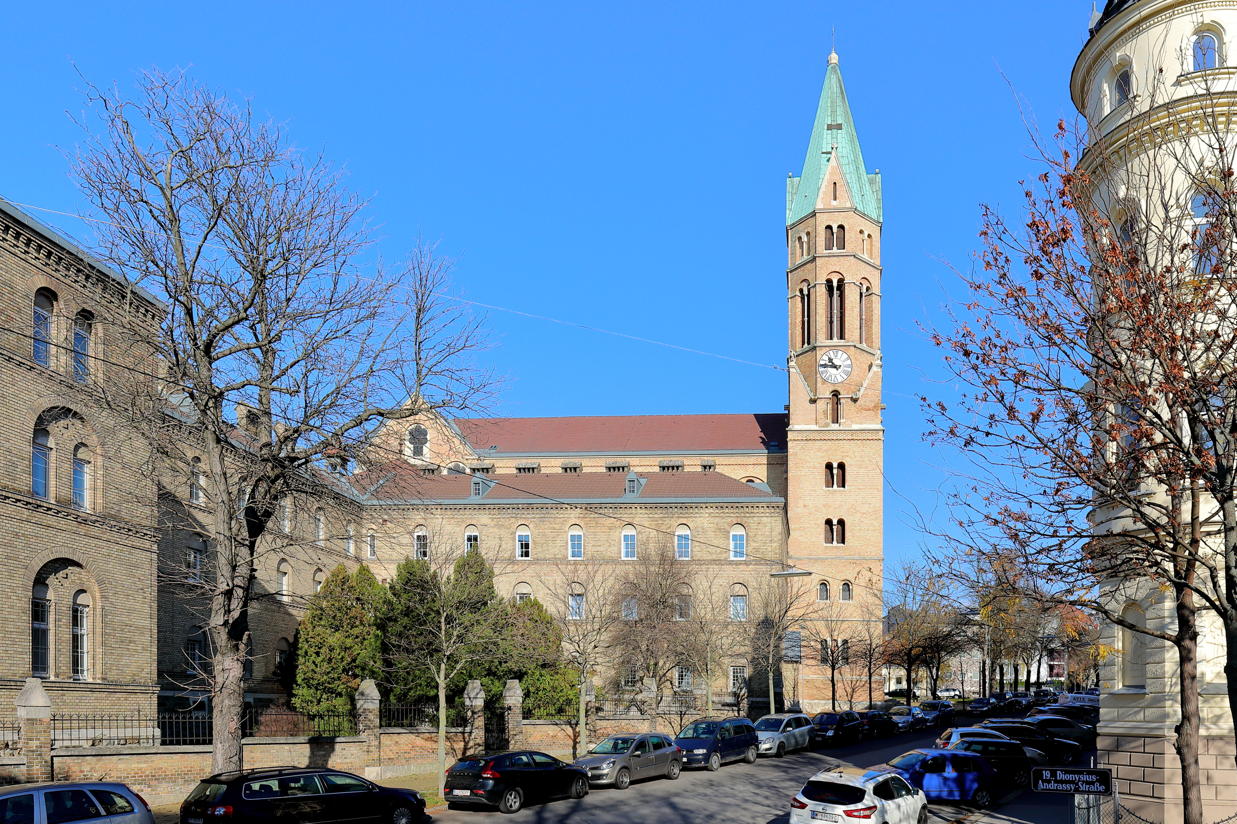 Südansicht des Karmelitenklosters im 19. Wiener Bezirk Döbling. Das Kloster und die Kirche in Form einer neuromanischen Basilika mit drei Schiffen und einer Doppelturmfassade wurde ab 1898 nach Plänen des Architekten Richard Jordan errichtet.